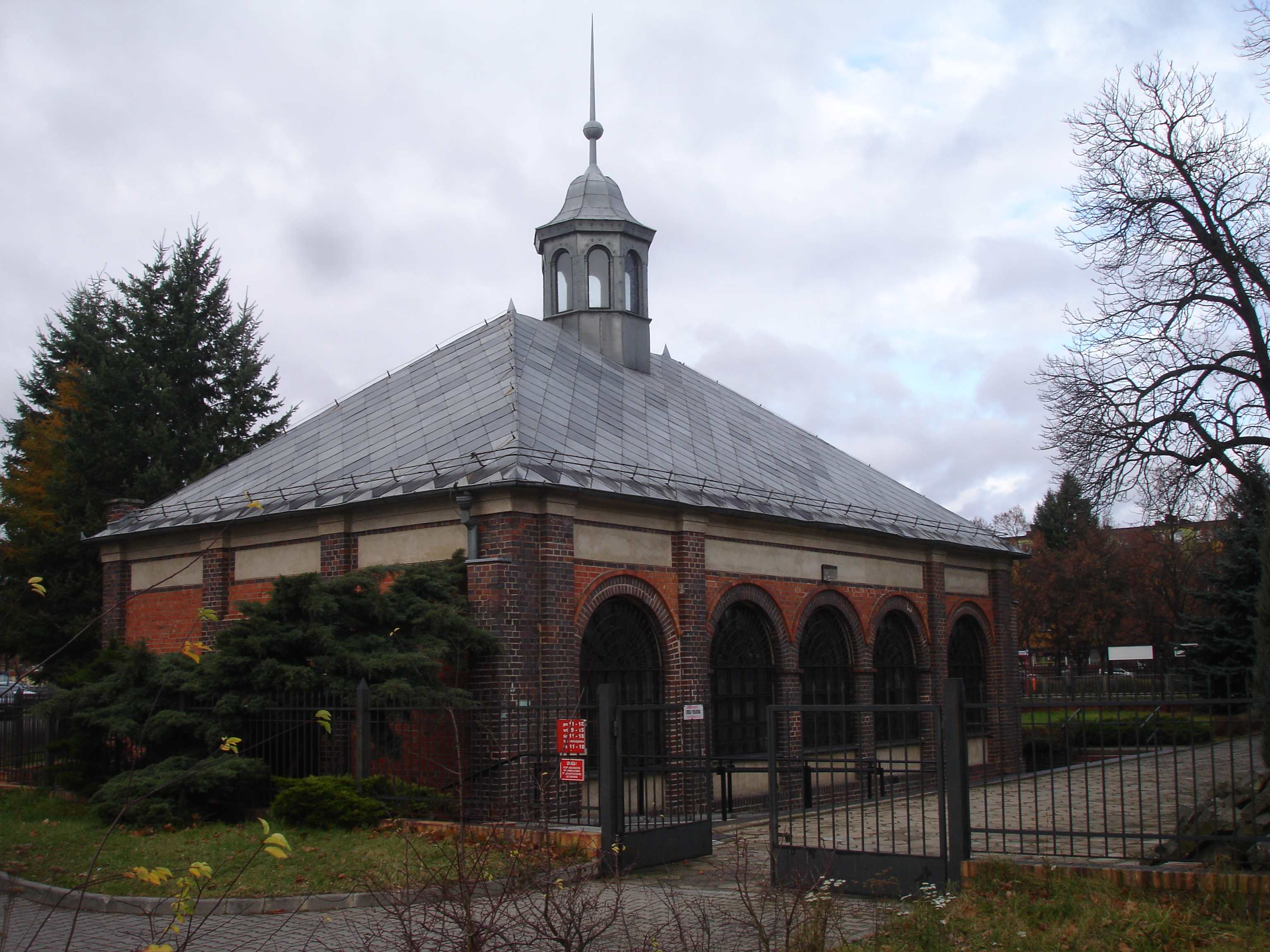 Dom przedpogrzebowy w Lesznie, Aleje Jana Pawła II 14